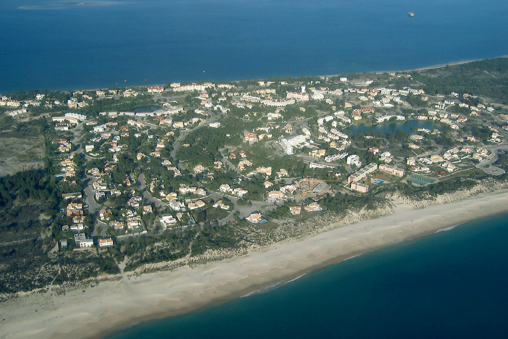 Soltroia (Portugal) air view